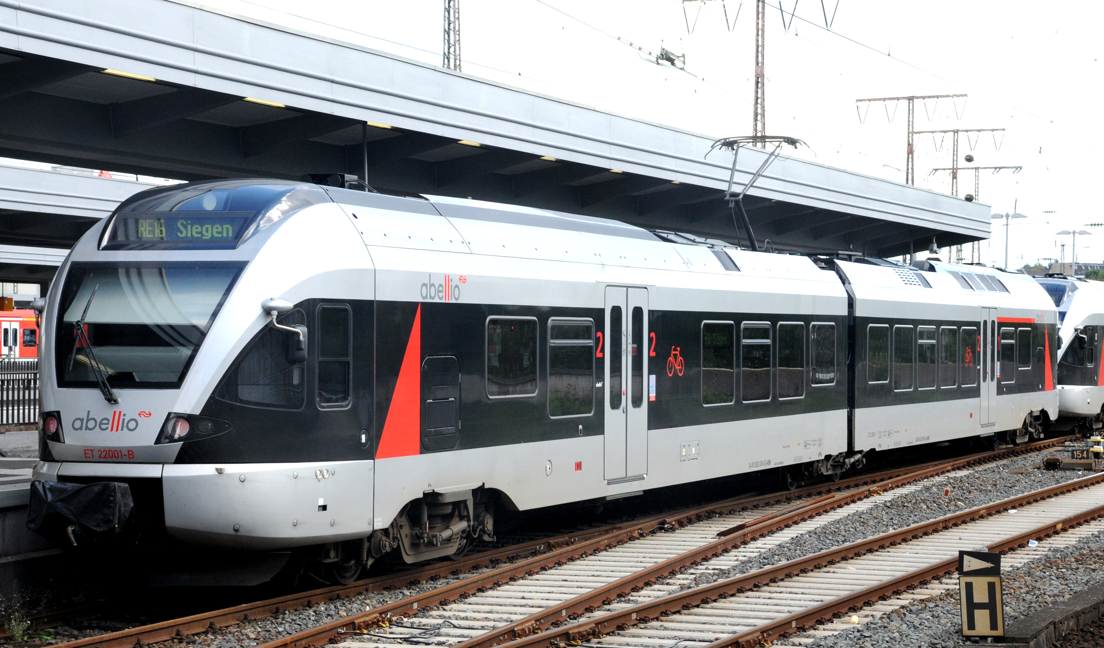 Abellio Rail treinstel ET 22.001 van het Stadler Rail type Flirt te Essen Hbf.